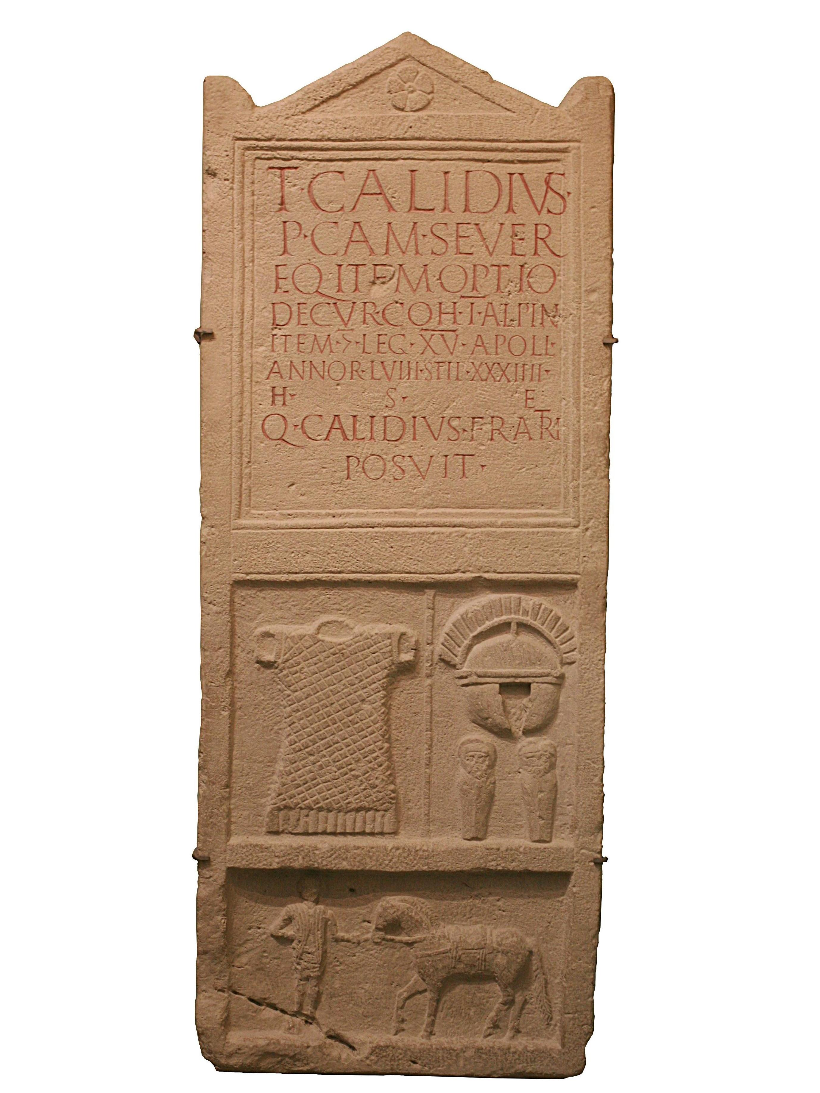 T(itus) Calidius / P(ublii filius) Cam(ilia tribu) Sever(us)/ eq(ues) item optio/ decur(io) coh(ortis) I Alpin(orum) / item (centurio) leg(ionis) XV Apoll(inaris) / annnor(um) LVIII stip(endorium) XXXIIII / h(ic) s(itus) e(est) / Q(uintus) Calidius fratri / posuit CIL III 11213